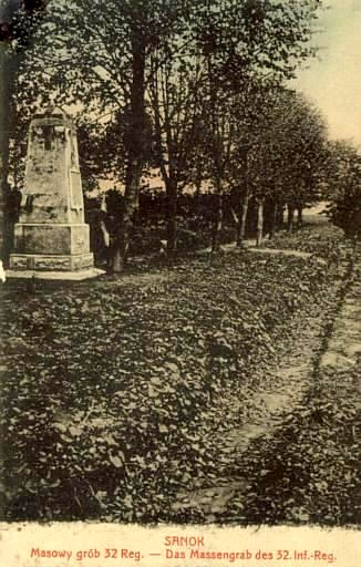 "Das Massengrab des 32. Infanterie-Regiment" (um 1915) in Sanok, wurde jedoch gegen Anfang der kommunistischen Diktatur zerstört.